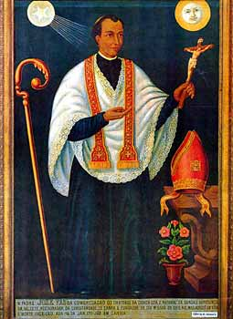 Joseph Vaz, Seliger, indischer Oratorianer, Apostel von Ceylon genannt